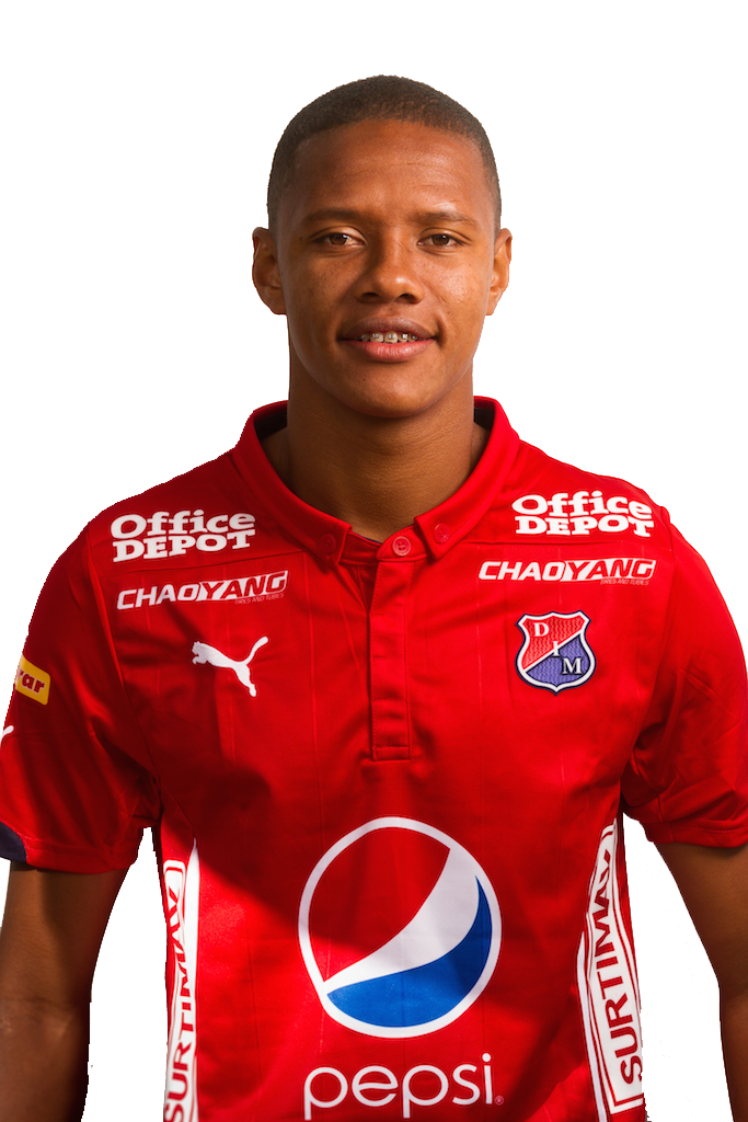 Yairo moreno medellin